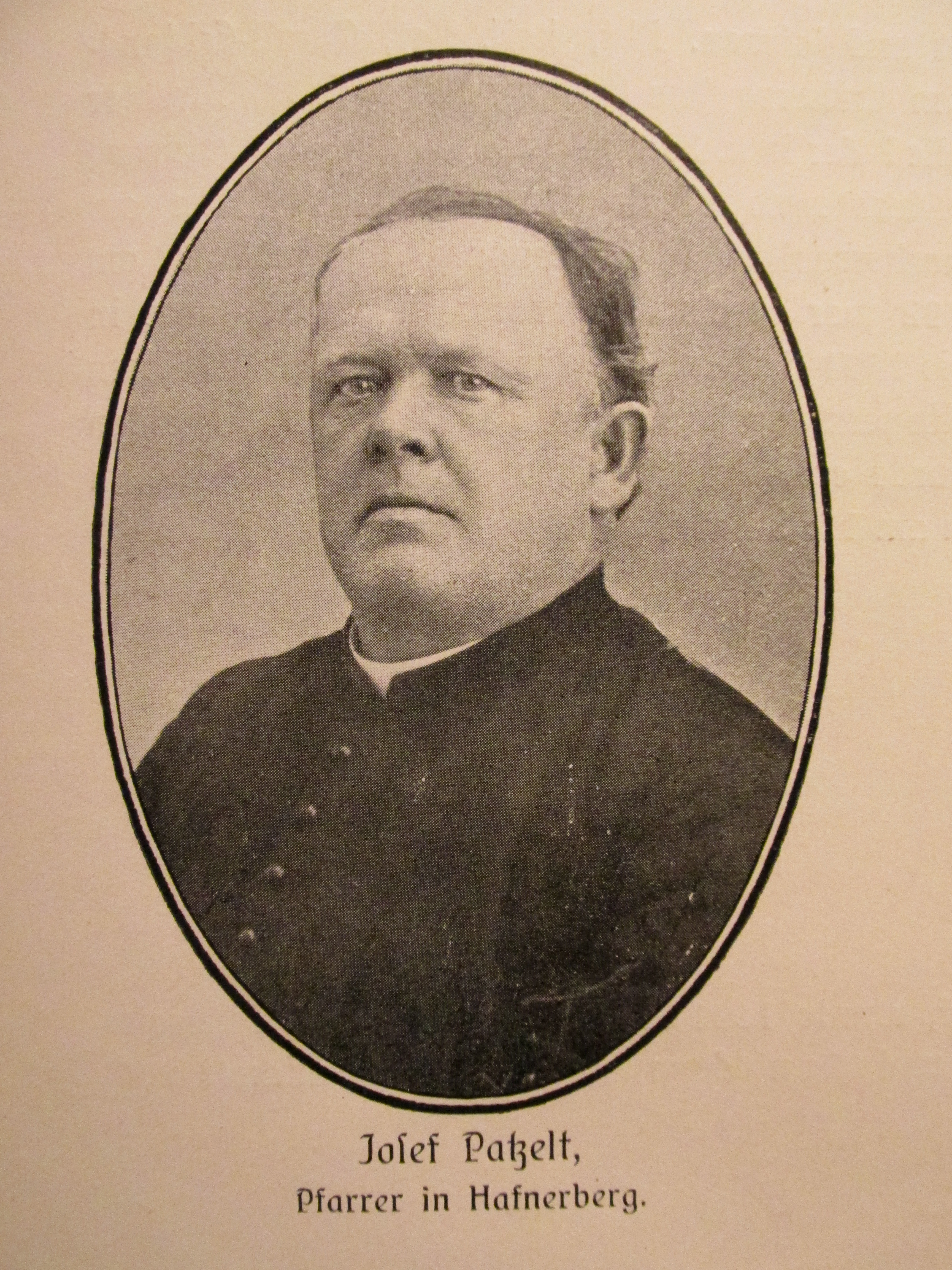 P. Josef Franz Patzelt; * 13. 03. 1853 Vansdorf, čp. 92; syn: Antona Patzelta - tkalce, syn Franze Patzelta - tkalce a Theresie roz. Lischka; Veronika, dcera Franze Seidkmanna - domkáře a Rosalie roz. Günnekrud; gymnaziální studia na Gymnáziu v Bohosudově; filosoficko - teologická studia v klášteře redemptoristů v Mautern u Steiermark; ord. na kněze 1876; kooperátor Furt; provisor Furth; kooperátor Baden; farář Drasenhofen + čestný občan Drasenhofen; farář Hafnerberg (od 1901)